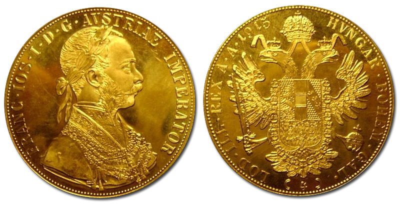 Österreichischer Vierfachdukaten